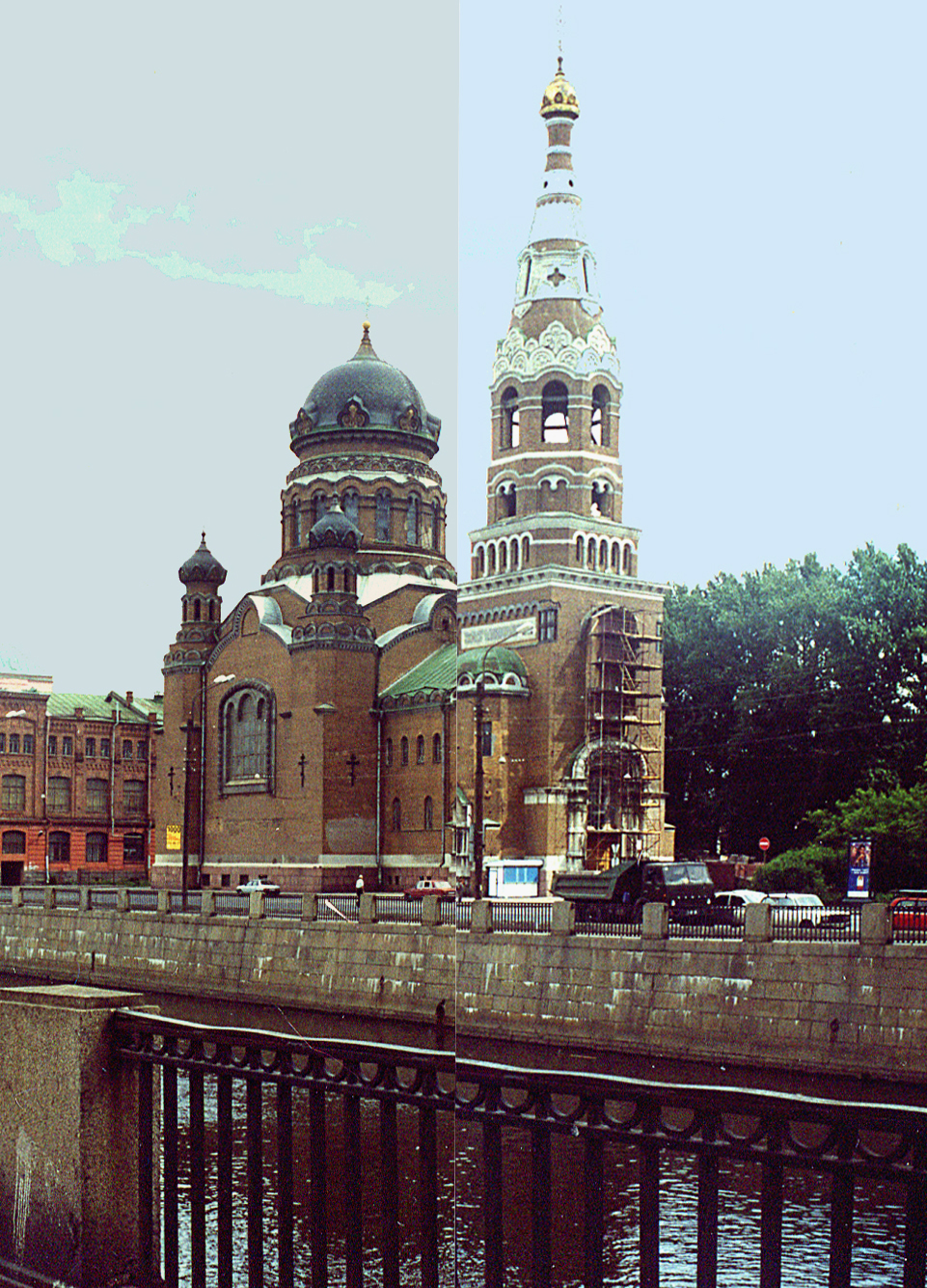 Церковь Воскресения Христова на Обводном канале. Архитектор Герман Давидович Гримм (1865-1942)